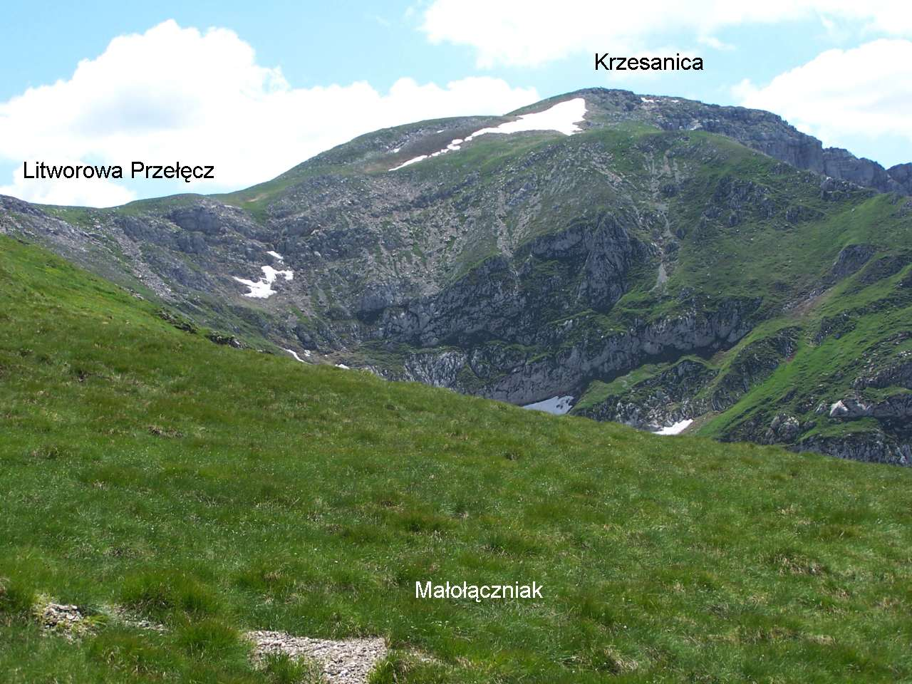 Litworowa Przełęcz (polska) (Tatra Mountains)